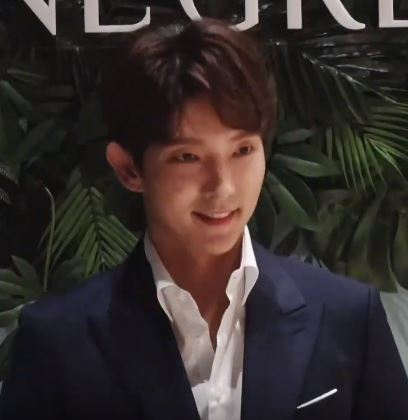 이준기가 10일 저녁 서울 영등포구 여의도의 한 빌딩에서 열린 포토행사에 참석했다.